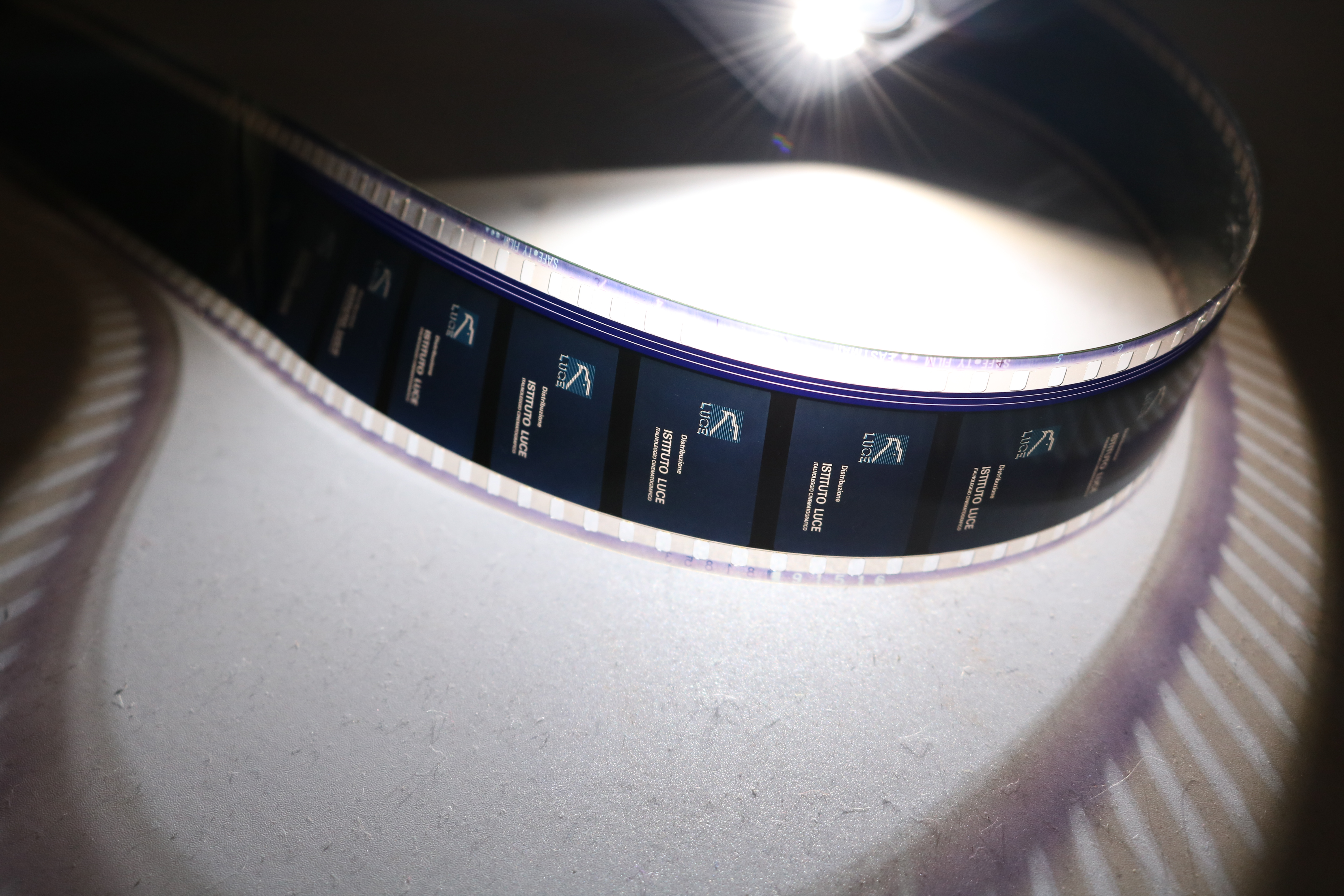 Un rollo de película 35mm iluminado con la linterna de un smartphone, tomado de una exhibición en el Centro Cultural PUCP. Por el logotipo del Instituto Luce que aparece al inicio del rollo, parece que proviene de una película italiana de no mas de 30 años.